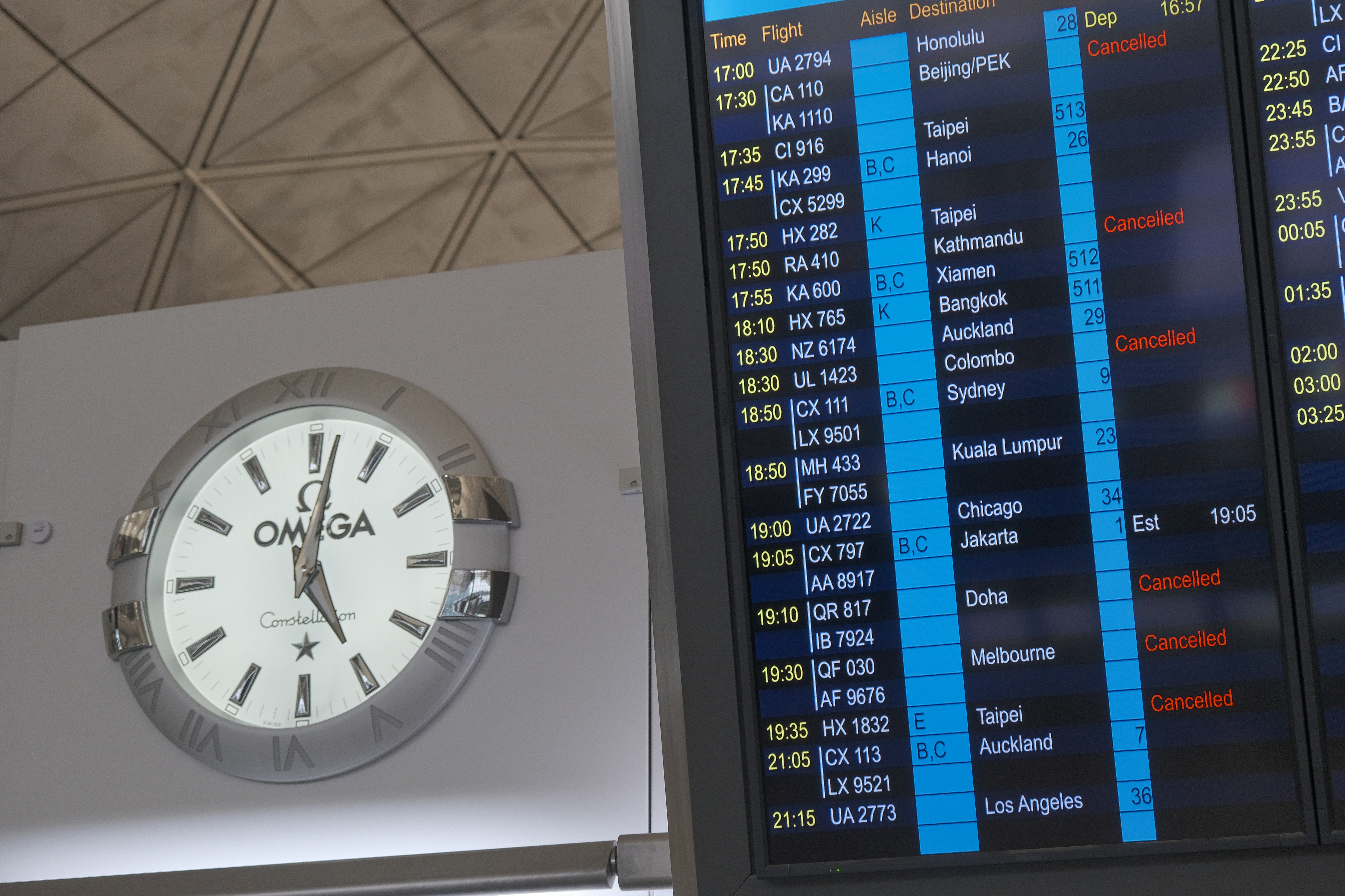 20200412 HK Airport